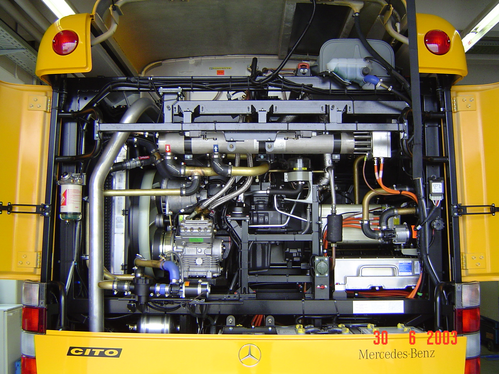 Mercedes-Benz O 520 Cito Motorraum